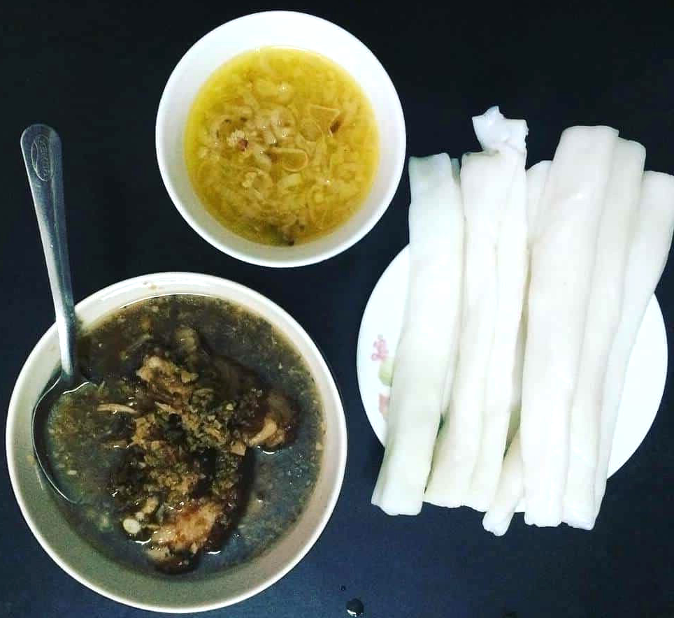 Bánh Gật gù Tiên Yên Quảng Ninh